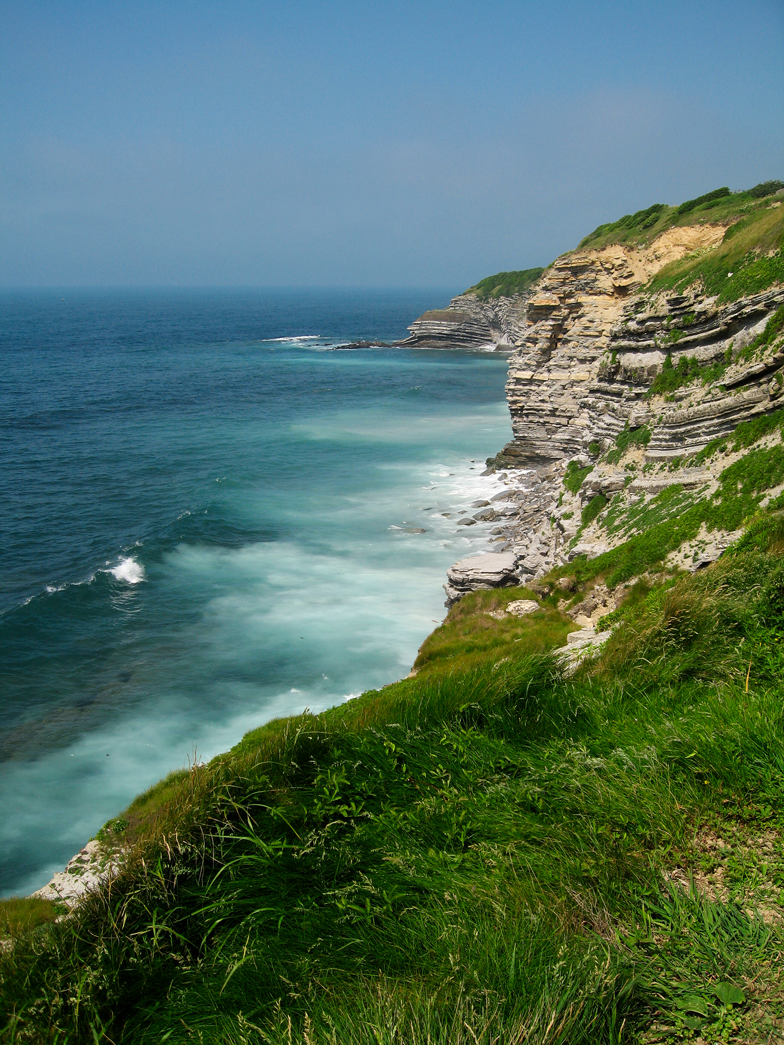 Falaise sainte Barbe à Saint-Jean-de-Luz (Pyrénées-Atlantiques, France).